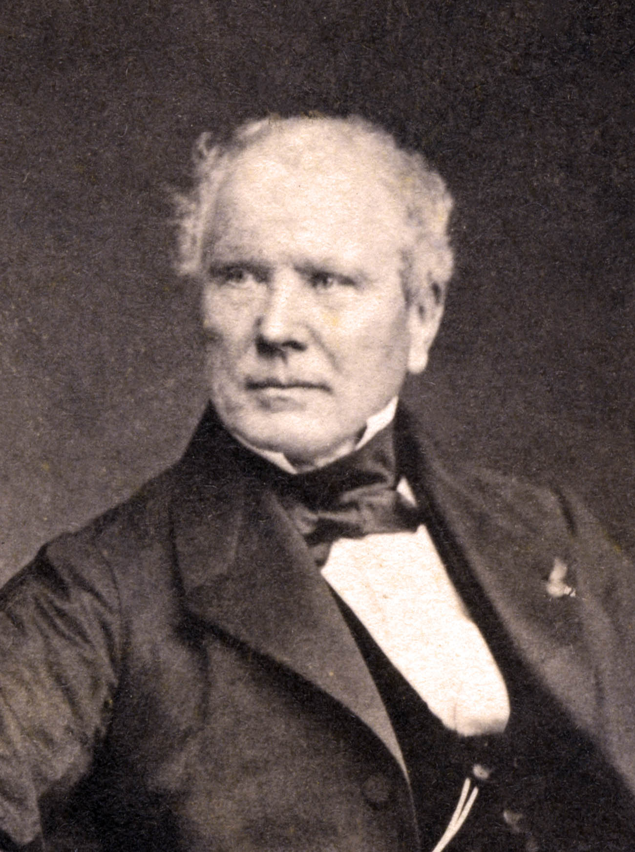 Denys Benoist d'Azy, député